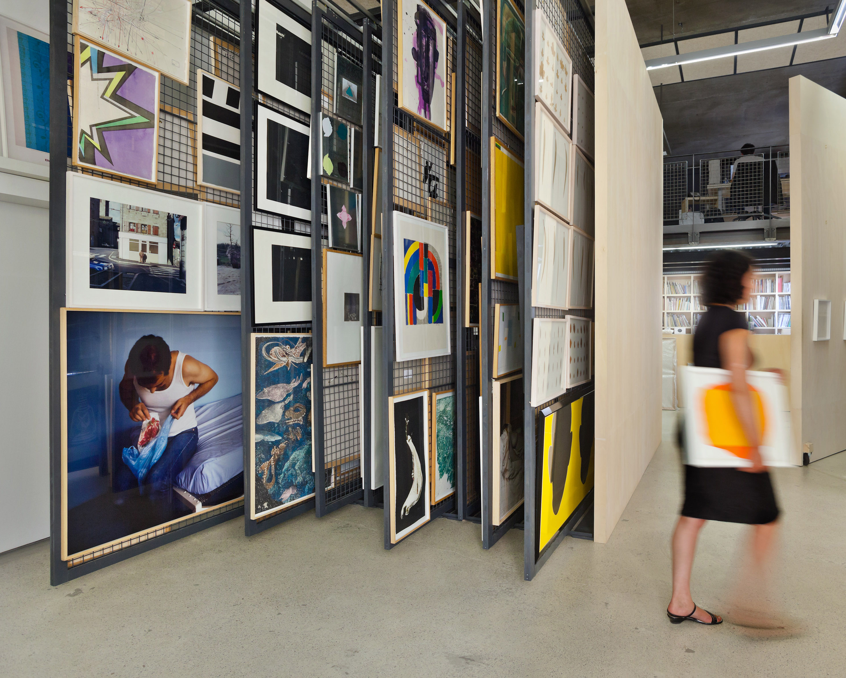 Site de prêt aux particuliers de l'Artothèque du Limousin à la Bibliothèque Francophone Multimédia de Limoges